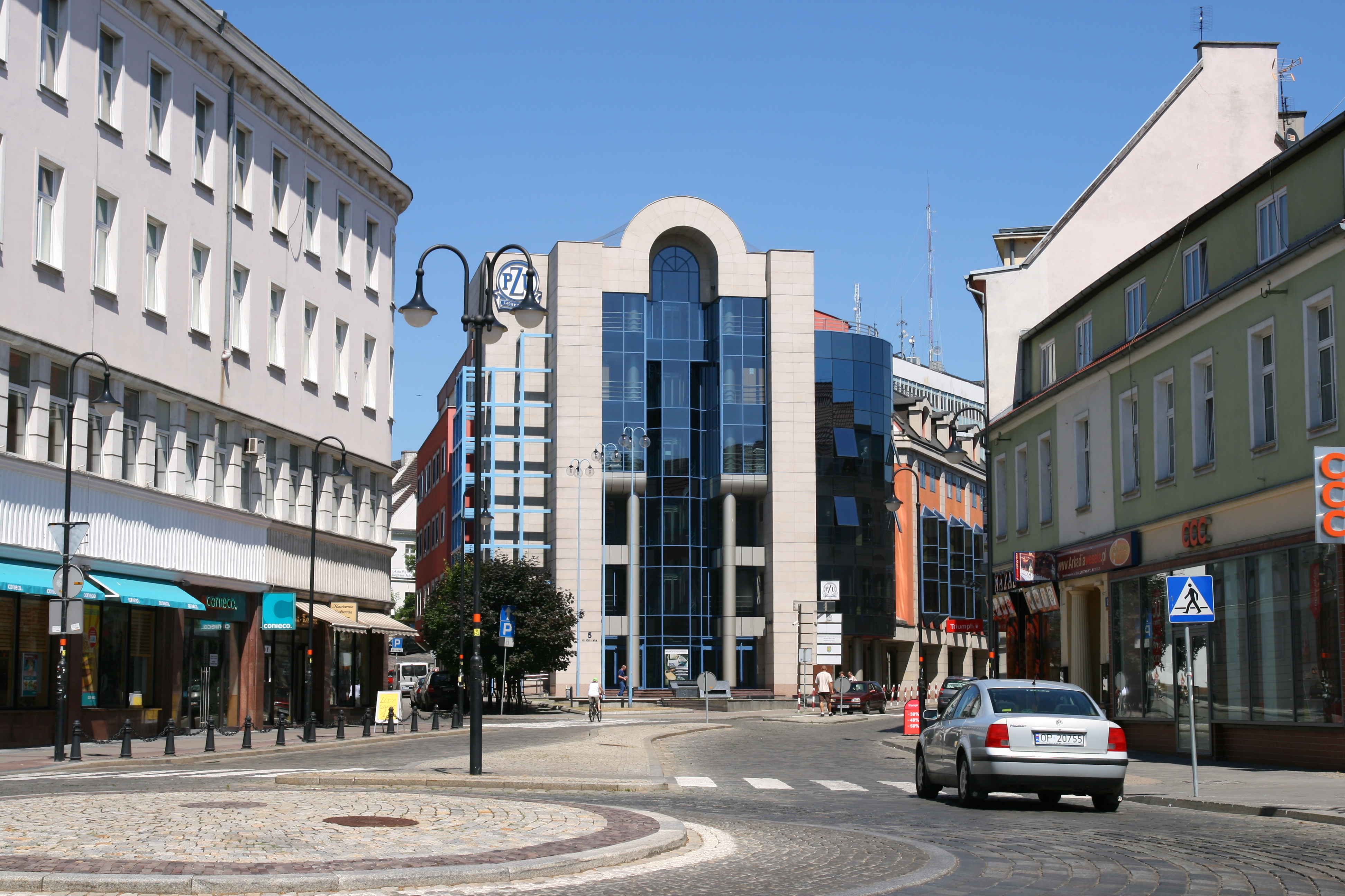 Budynek PZU w Opolu.